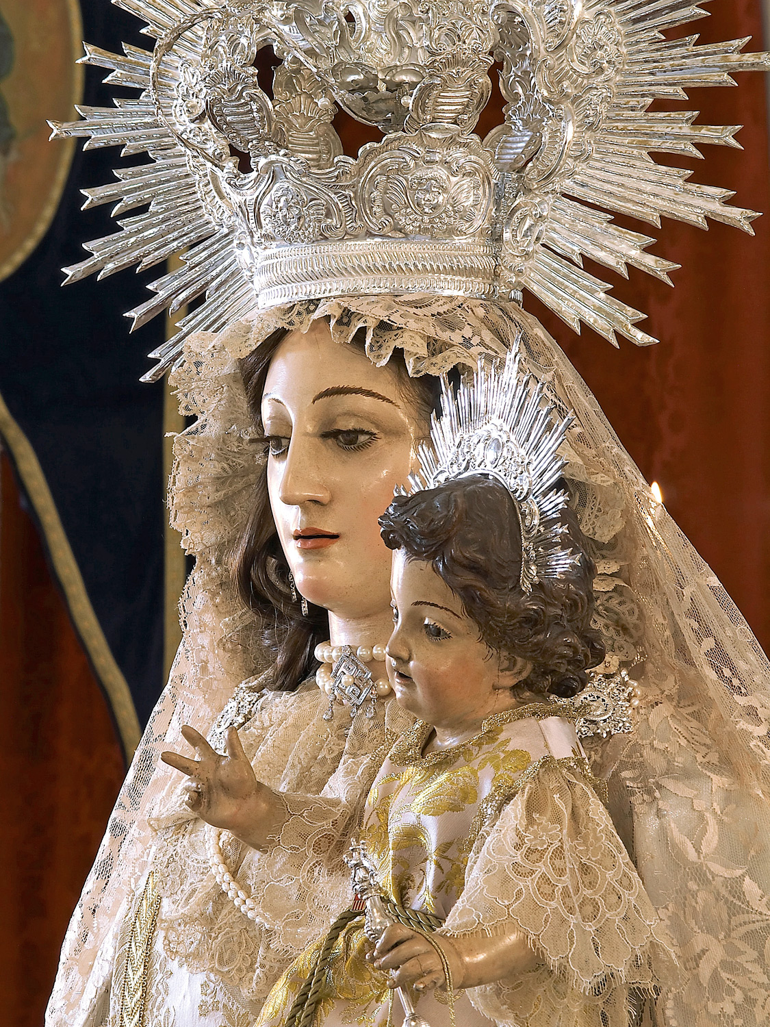 Besamano de Ntra. Sra. de las Mercedes de San Fernando (Cádiz) ESPAÑA